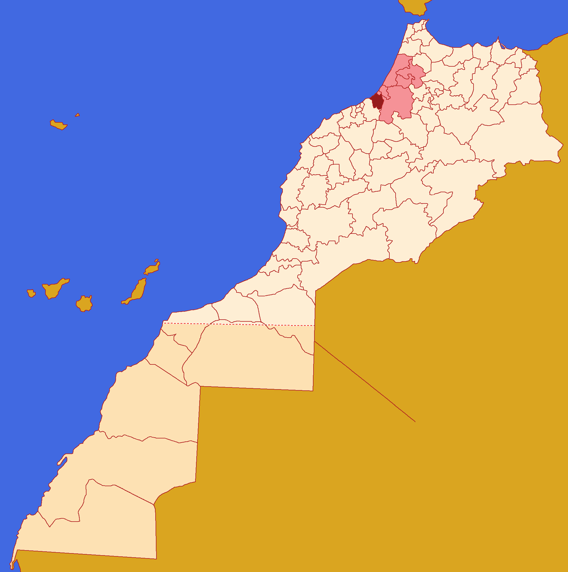 Localização da prefeitura de Skhirate-Témara, dentro da região de Rabat-Salé-Kénitra, dentro de Marrocos, conforme a reforma administrativa de 2015